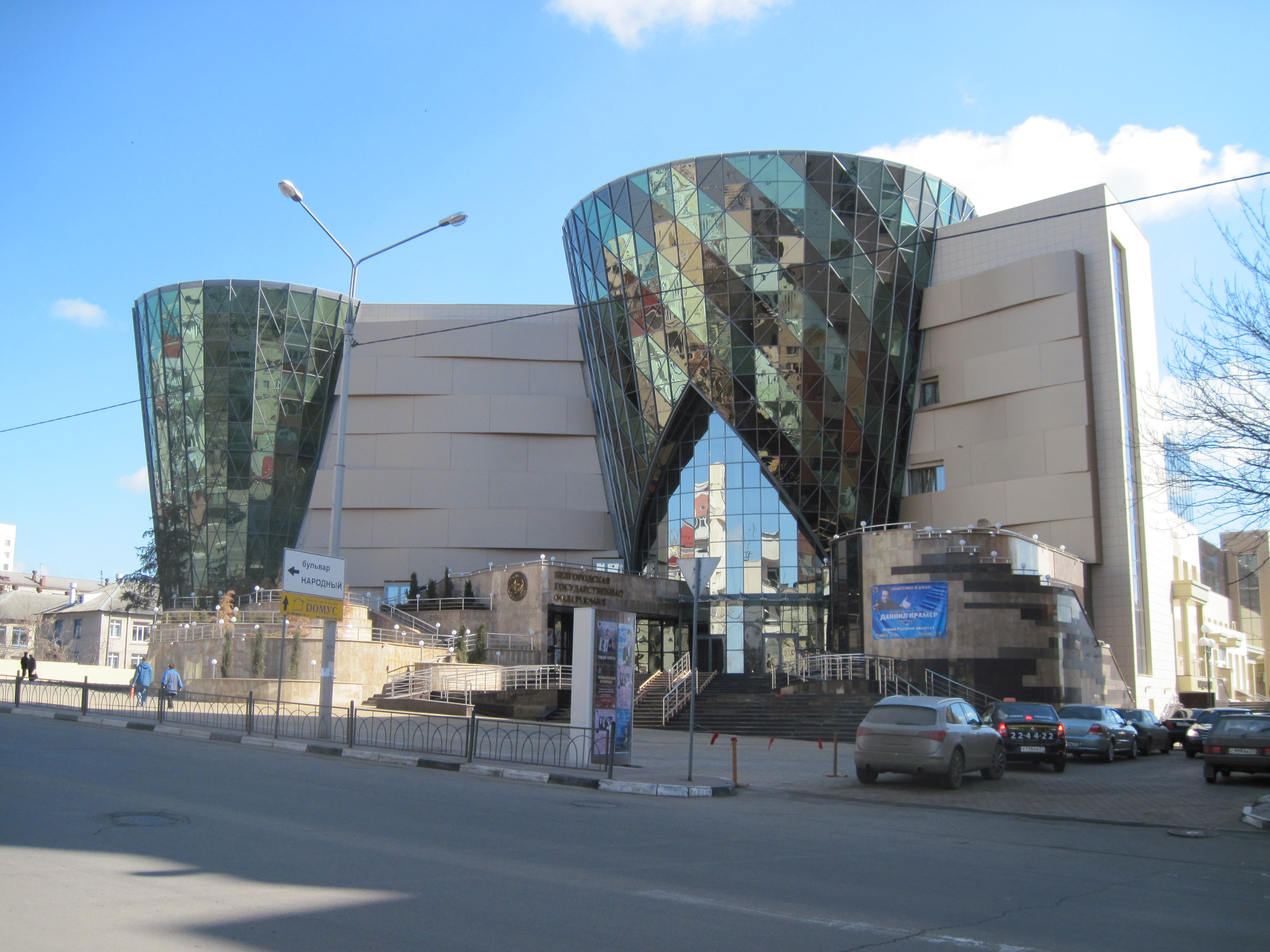 Белгородская Государственная Филаромния (бывш. ДК Железнодорожник)